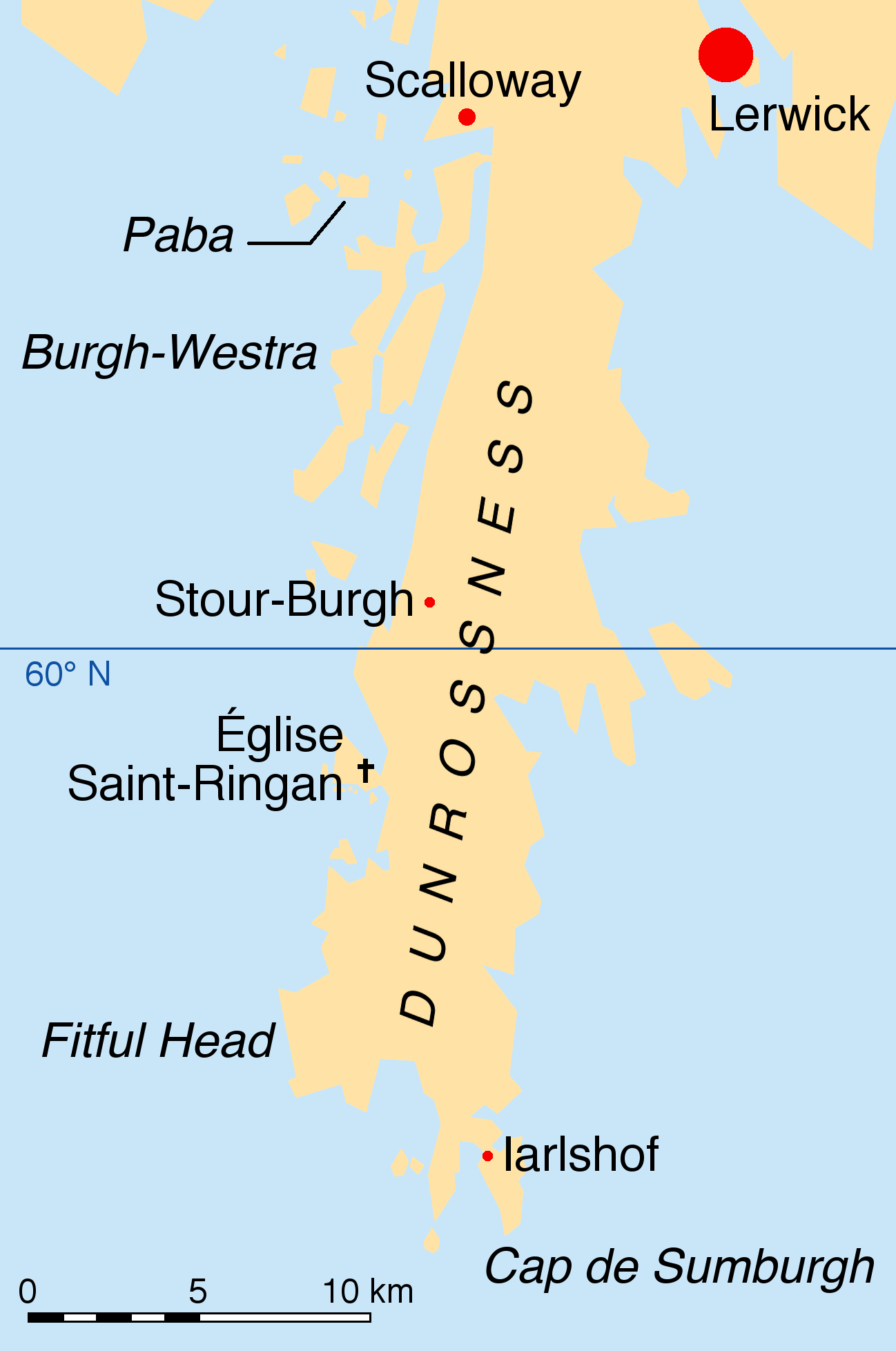 Lieux, aux Shetland, au sud de Mainland, du roman historique Le Pirate de Walter Scott, d'après une carte du XVIIe siècle. Quelques lieux se retrouvent sans problème. D'autres, réels ou imaginaires, sont situés d'après les indications de l'auteur : « Burgh-Westra » semble être Burra Ouest ; « Paba » doit être Papa ; la ferme de Stour-Burgh (ou Harfra) n'existe peut-être pas. Scott situe Fitful Head au nord-ouest de l'île ; il est en réalité au sud-ouest. « Iarlshof » est donné par le traducteur Defauconpret pour Jarlshof.